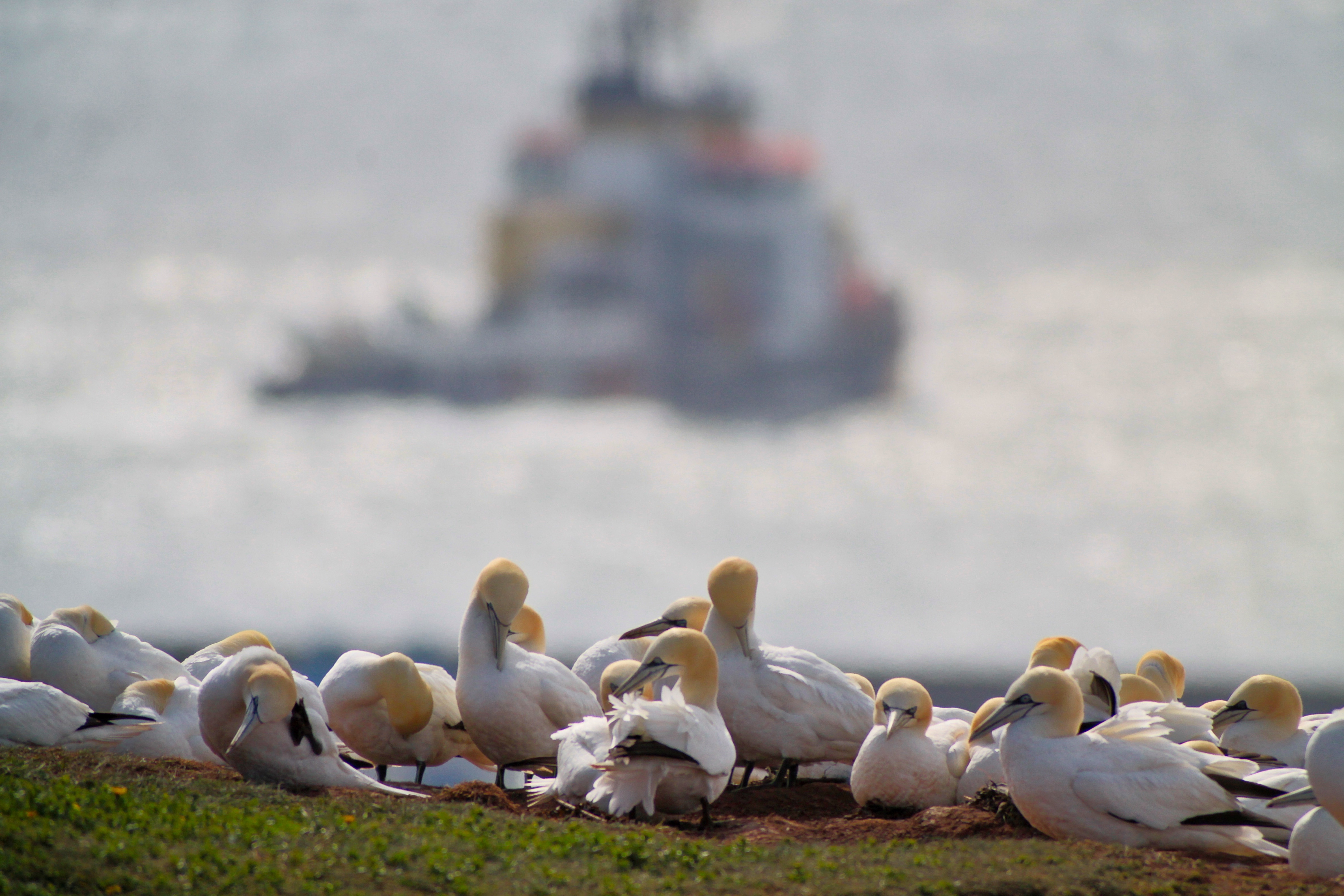 Basstölpelkolonie auf Helgoland